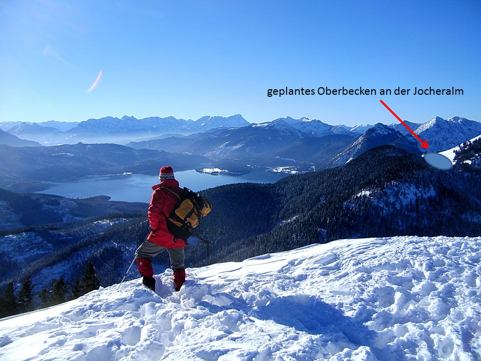 Oberbecken an der Jocheralm